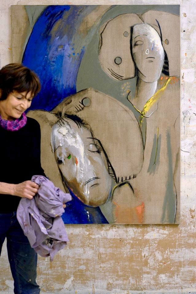 17 rue Jules Chaplain Paris 75006